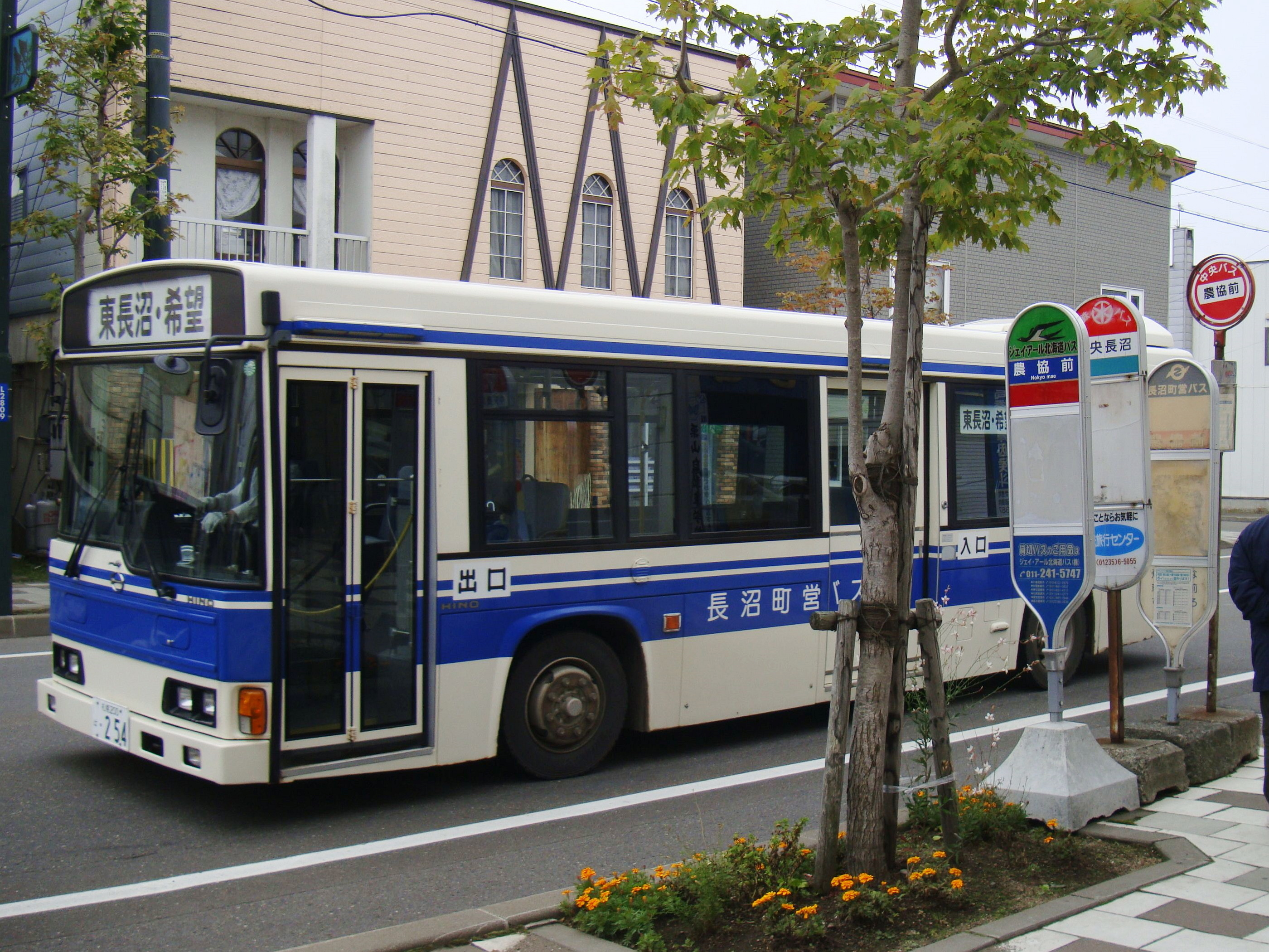 Naganuma loop line